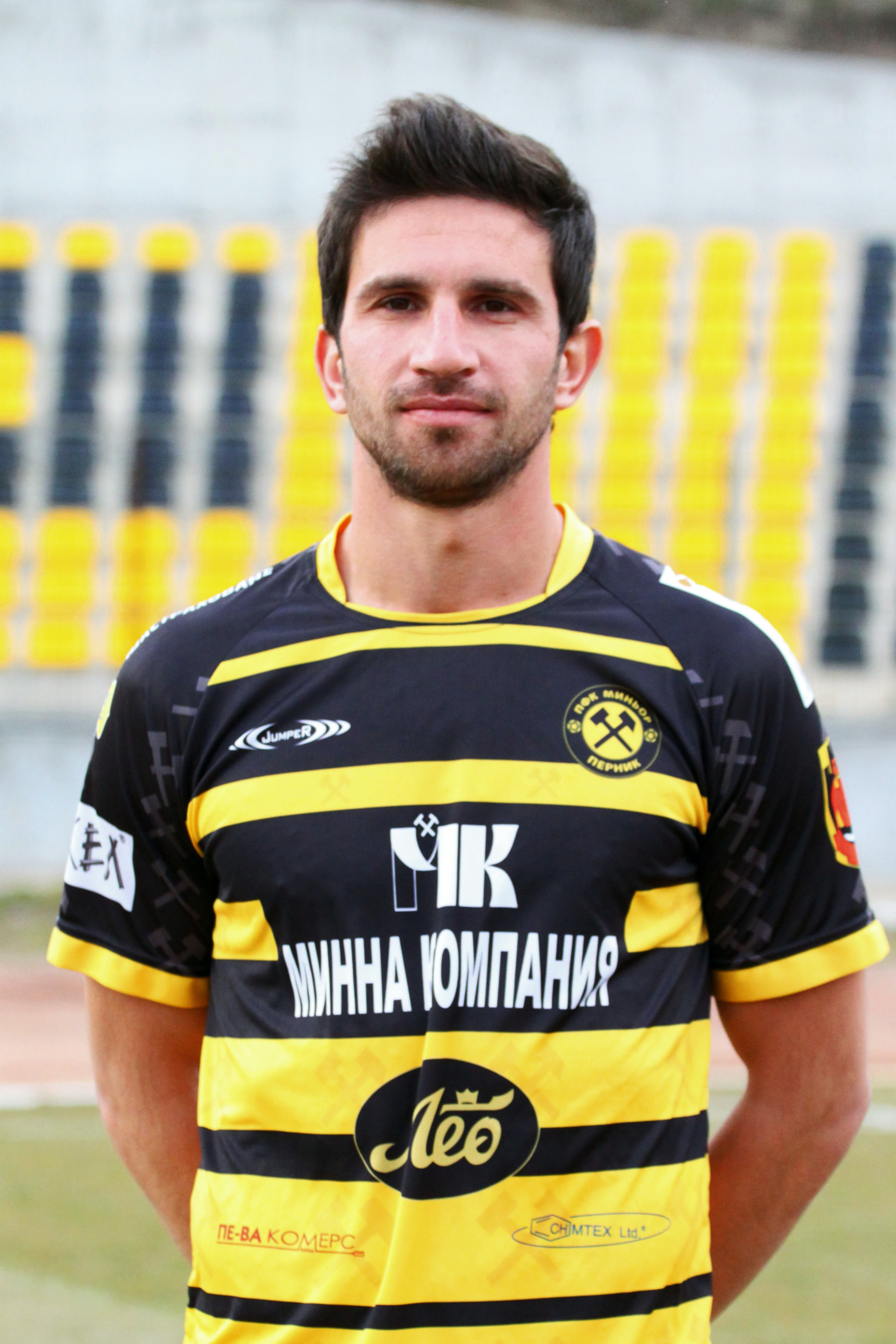 Крум Бибишков - български футболист, състезател на Миньор (Перник).